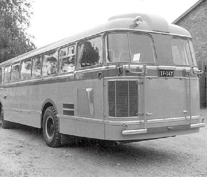 Vanaja VAT-4800 rear engined bus from 1956. Coachwork by K. Nummela Oy.